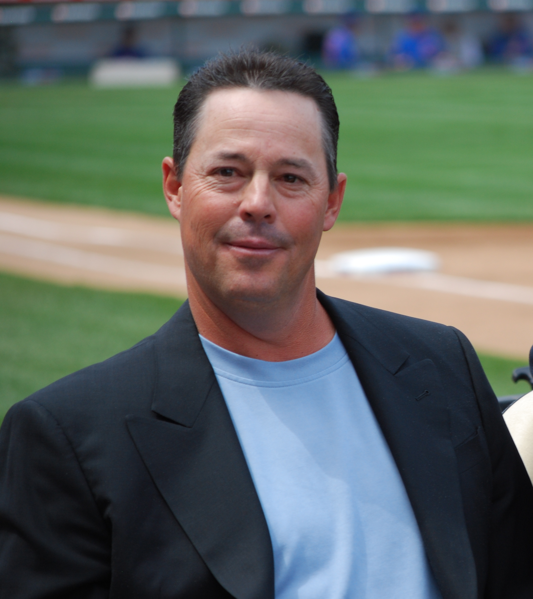 Gregg Maddux in 2009